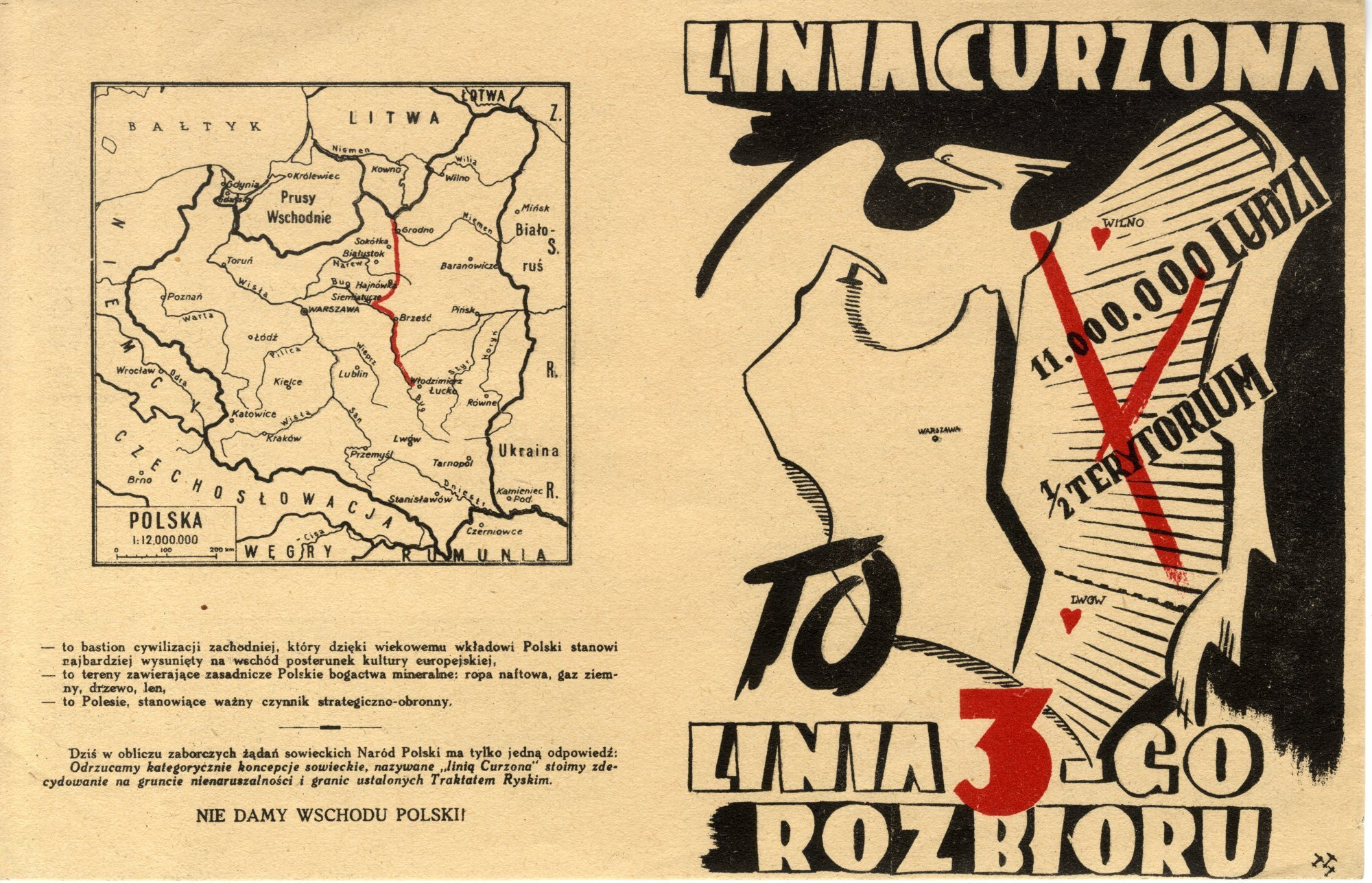 to bastion cywilizacji zachodniej, który dzięki wiekowemu wkładowi Polski stanowi najbardziej wysunięty na wschód posterunek kultury europejskiej, - to tereny zawierające zasadnicze Polskie bogactwa mineralne: ropa naftowa, gaz ziemny, drzewo, len, - to Polesie, stanowiące ważny czynnik strategiczno-obronny, Dziś w obliczu zaborczych żądań sowieckich Naród Polski ma tylko jedną odpowiedź: Odrzucamy kategorycznie koncepcje sowieckie, nazywane „linią Curzona” stoimy zdecydowanie na gruncie nienaruszalności i granic ustalonych Traktatem Ryskim. NIE DAMY WSCHODU POLSKI!